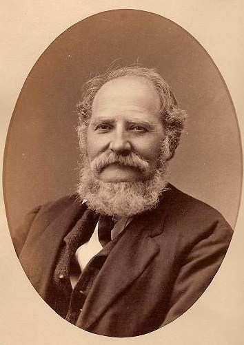 Porträit Adolphus Lotze um 1870